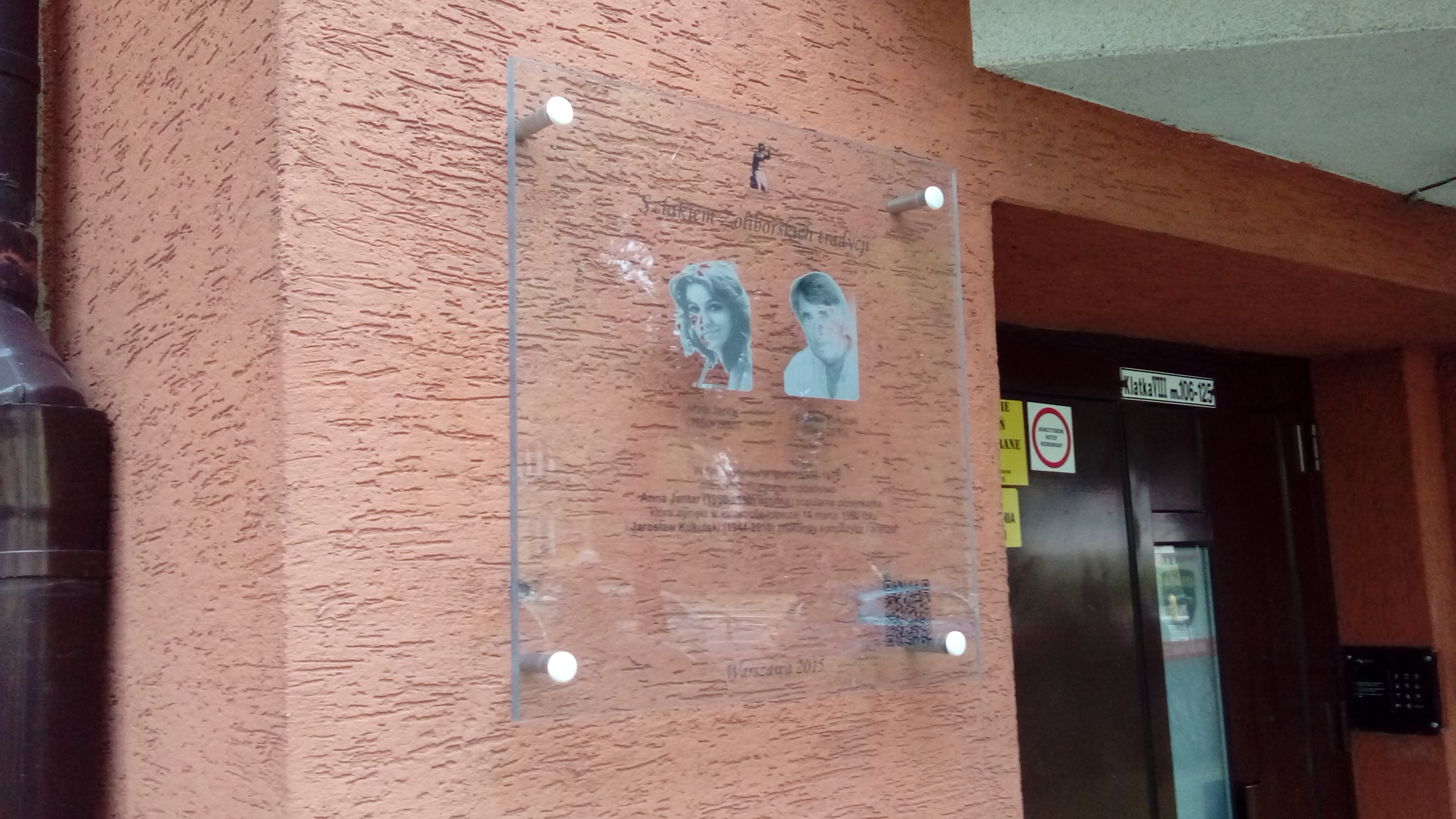 Tablica upamiętniająca Annę Jantar i Jarosława Kukulskiego na dawnym mieszkaniu na Żoliborzu